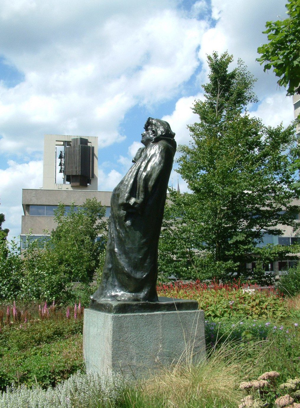 Honoré de Balzac, van Auguste Rodin; voor het van Abbemuseum in Eindhoven